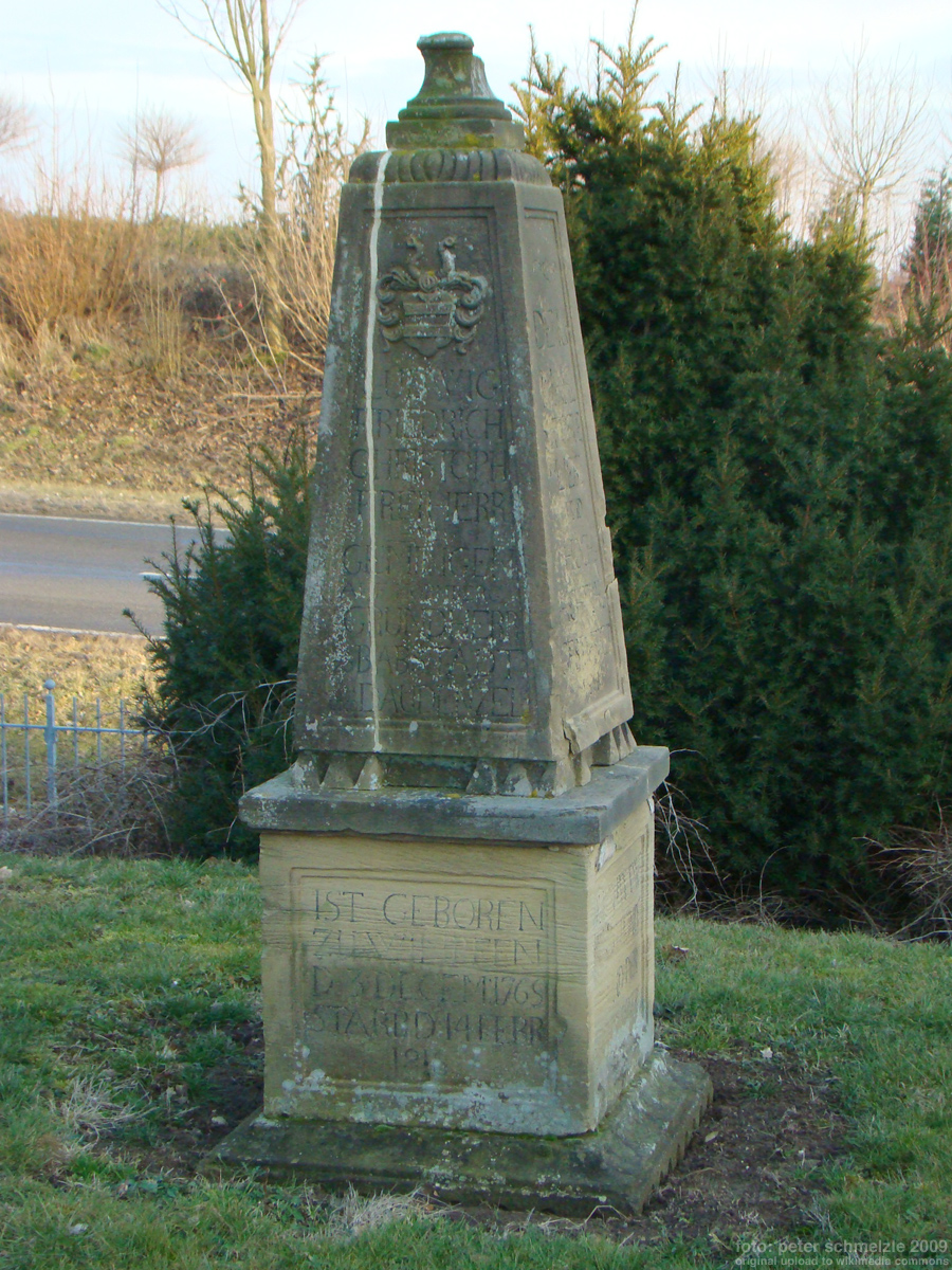 Grabmal für Freiherr Ludwig Friedrich Christoph von Gemmingen-Hornberg (1765–1816) in der Familiengrablege der Freiherren von Gemmingen in Bad Rappenau-Babstadt